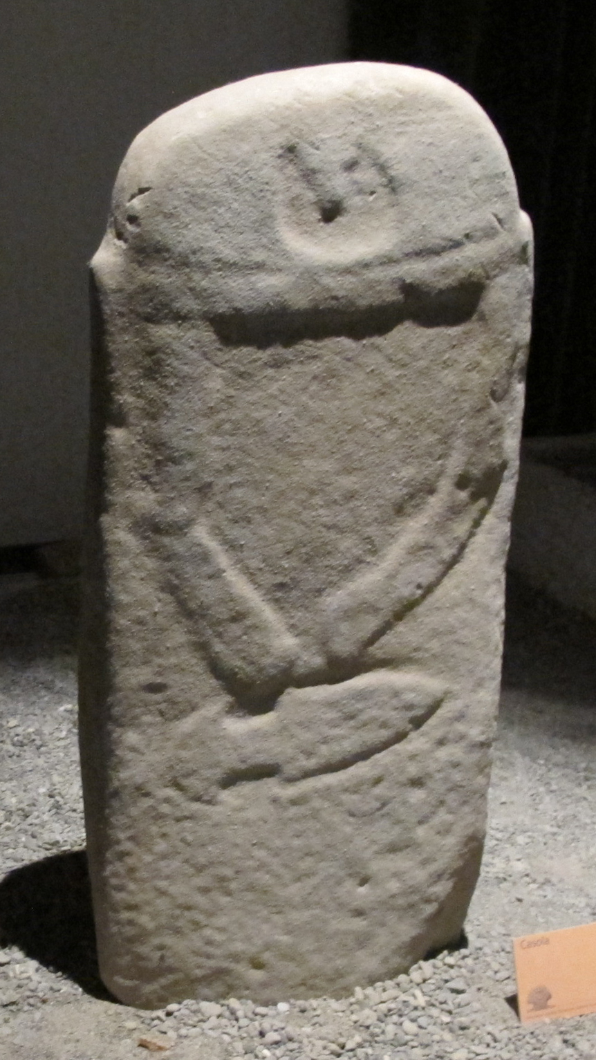 Tipo A, stele di casola